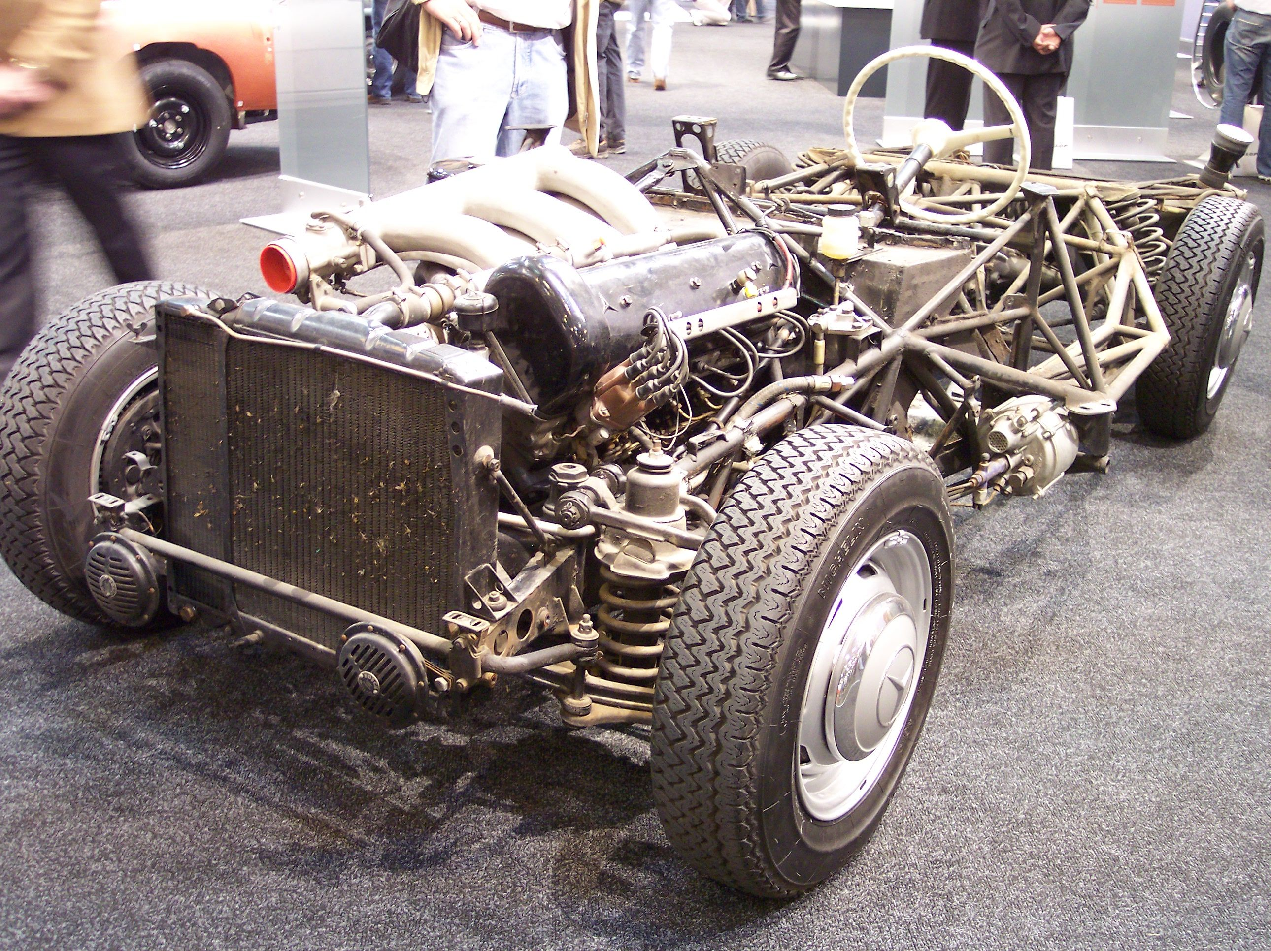 Mercedes-Benz SL 300 Chassis